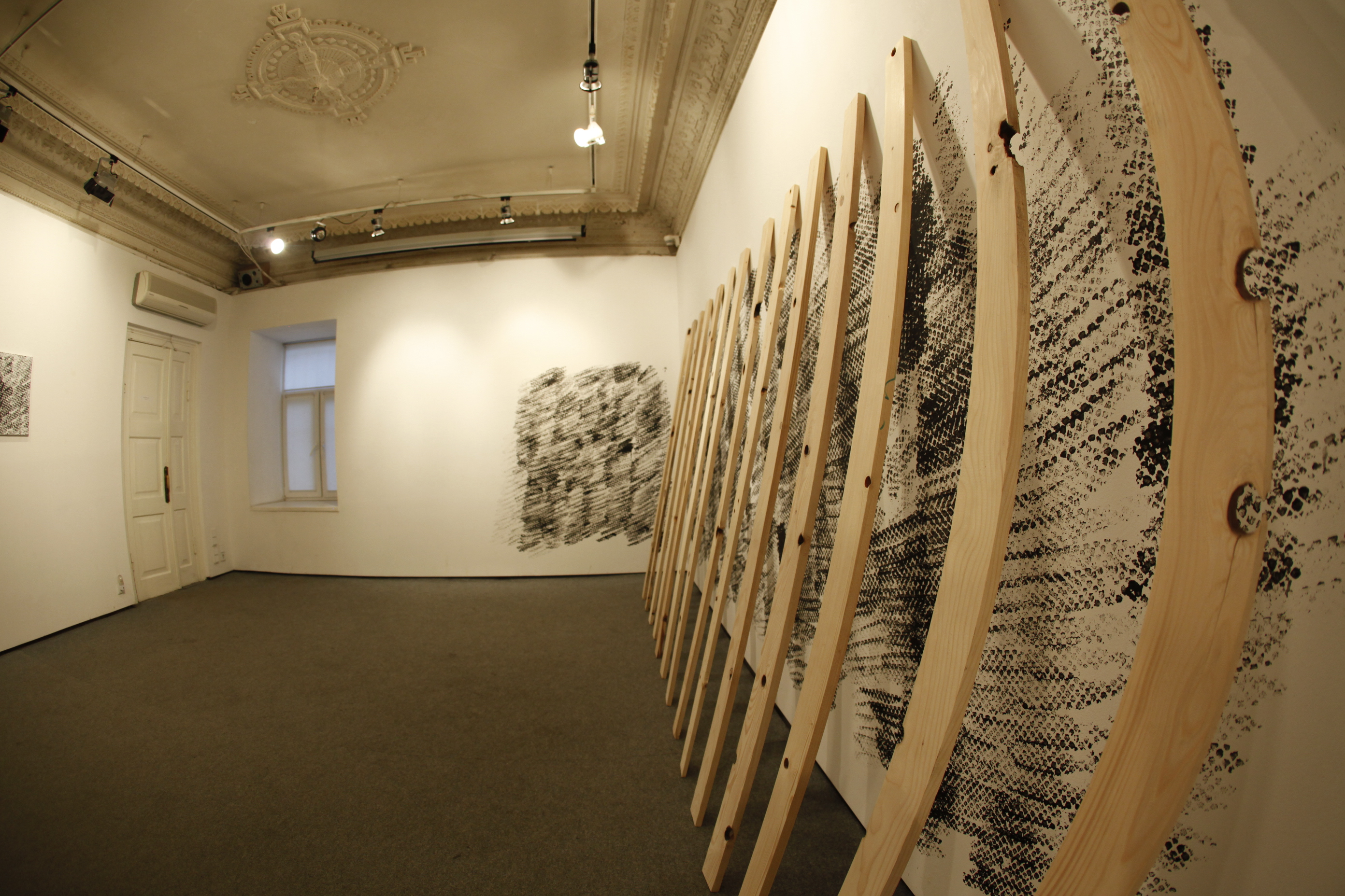 Мирослав Вайда"Зимно", 2014